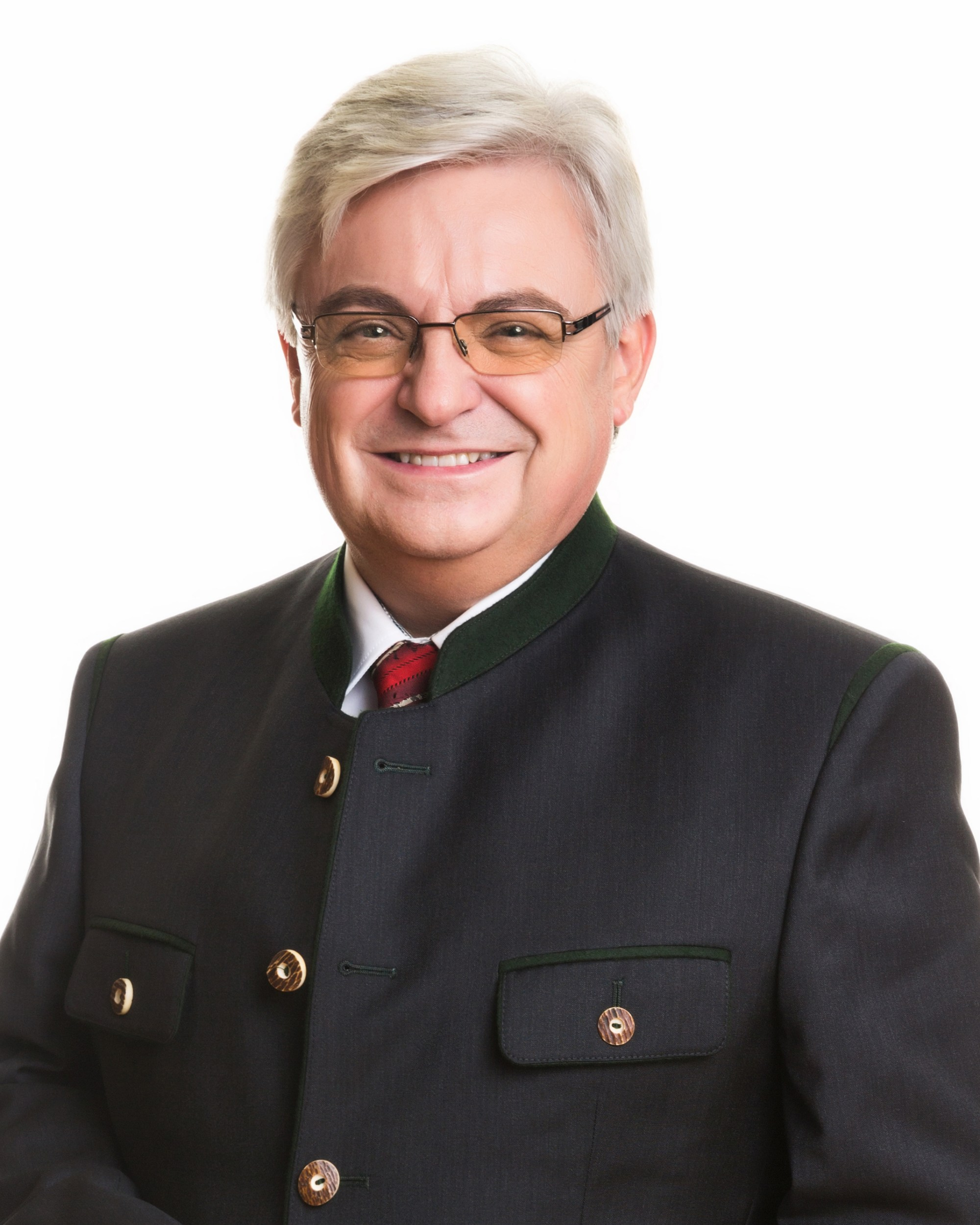 Bürgermeister der Marktgemeinde Grafendorf bei Hartberg Johann Handler.